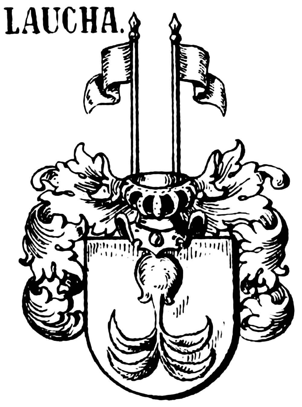 Wappen derer von Laucha